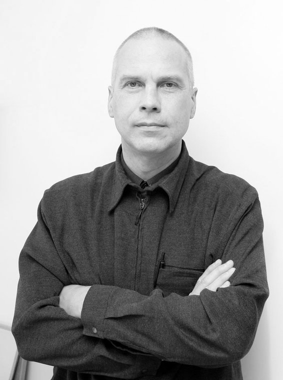 Raivo Puusepp